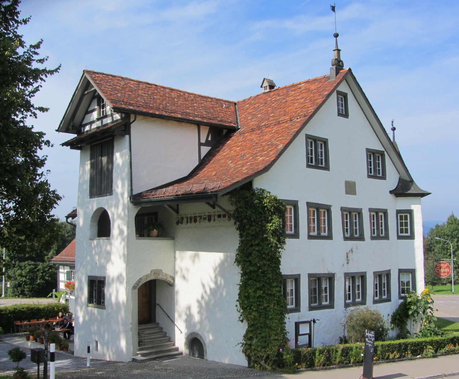 Das Haggenschlössli